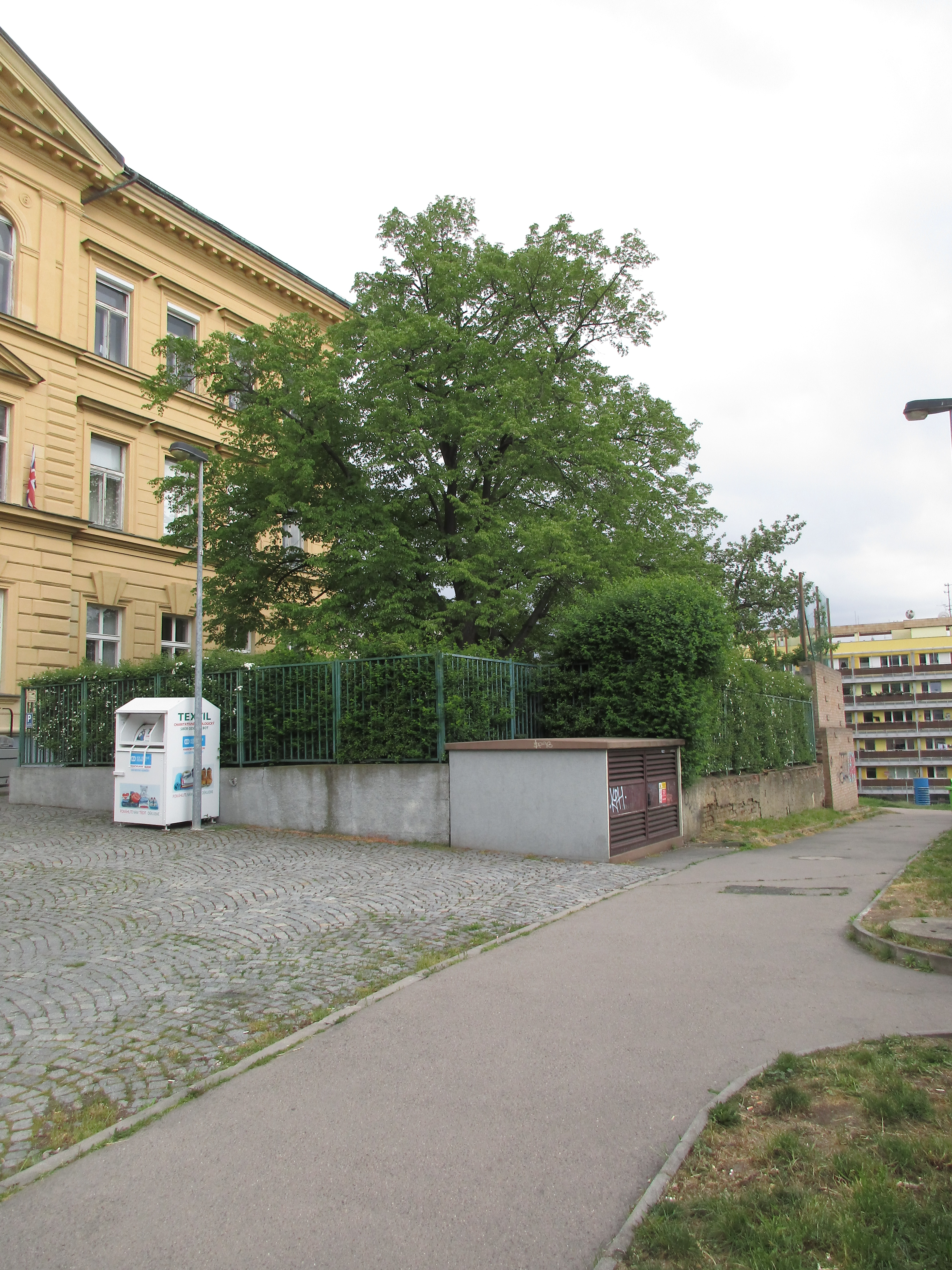 Lípa malolistá (Tilia cordata). Praha 9 - Vysočany, Sokolovská 139/320. Vysazena 27. října 1928 na památku vzniku Československé republiky. Významný strom, evidenční číslo MHMP: 10, v databázi od roku 2013.